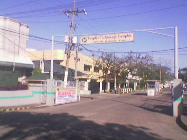 Tagalog: Ang bukana ng People's Technology Complex sa Carmona, Cavite. Dito matatagpuan ang isa sa malalaking pagawaang pang-elektroniko, ang ROHM Philippines.